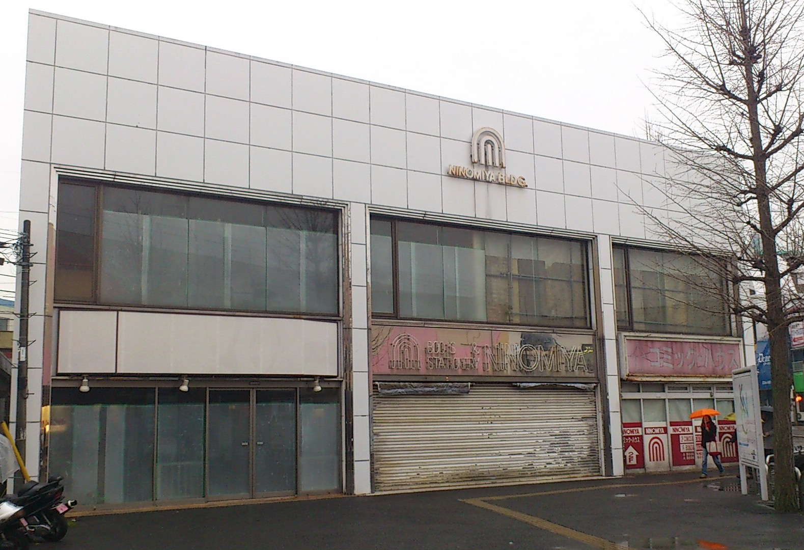 駅前の再整備計画に伴い、既存の店舗が全て閉店となった二宮ビル。メイン店舗のブックス二宮 二俣川本店は2012年1月20日に閉店した。 ※本屋の左側のテナントにはケンタッキーもあったが、それ以前に閉店している。また、さらに遡るとケンタッキーの前にはロッテリアがあった。